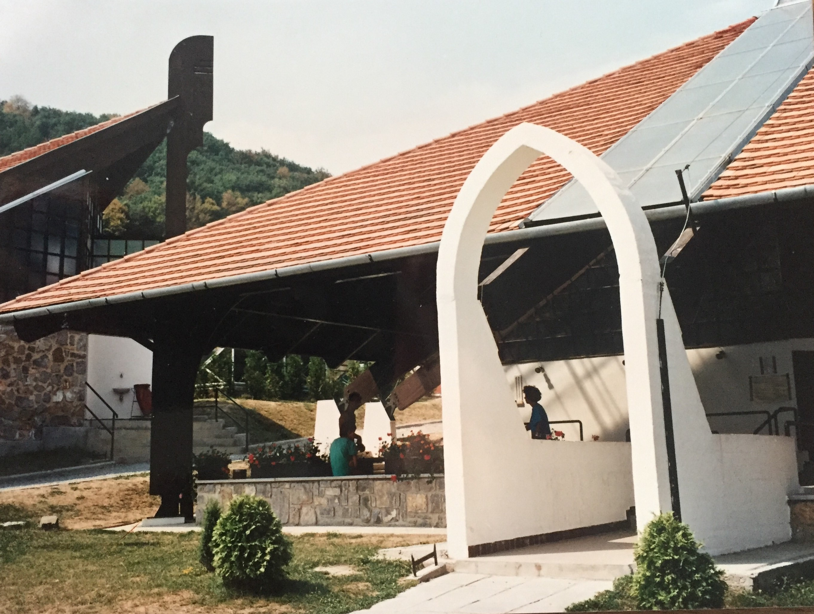 Orfűi vízi-sporttelep és üdülő